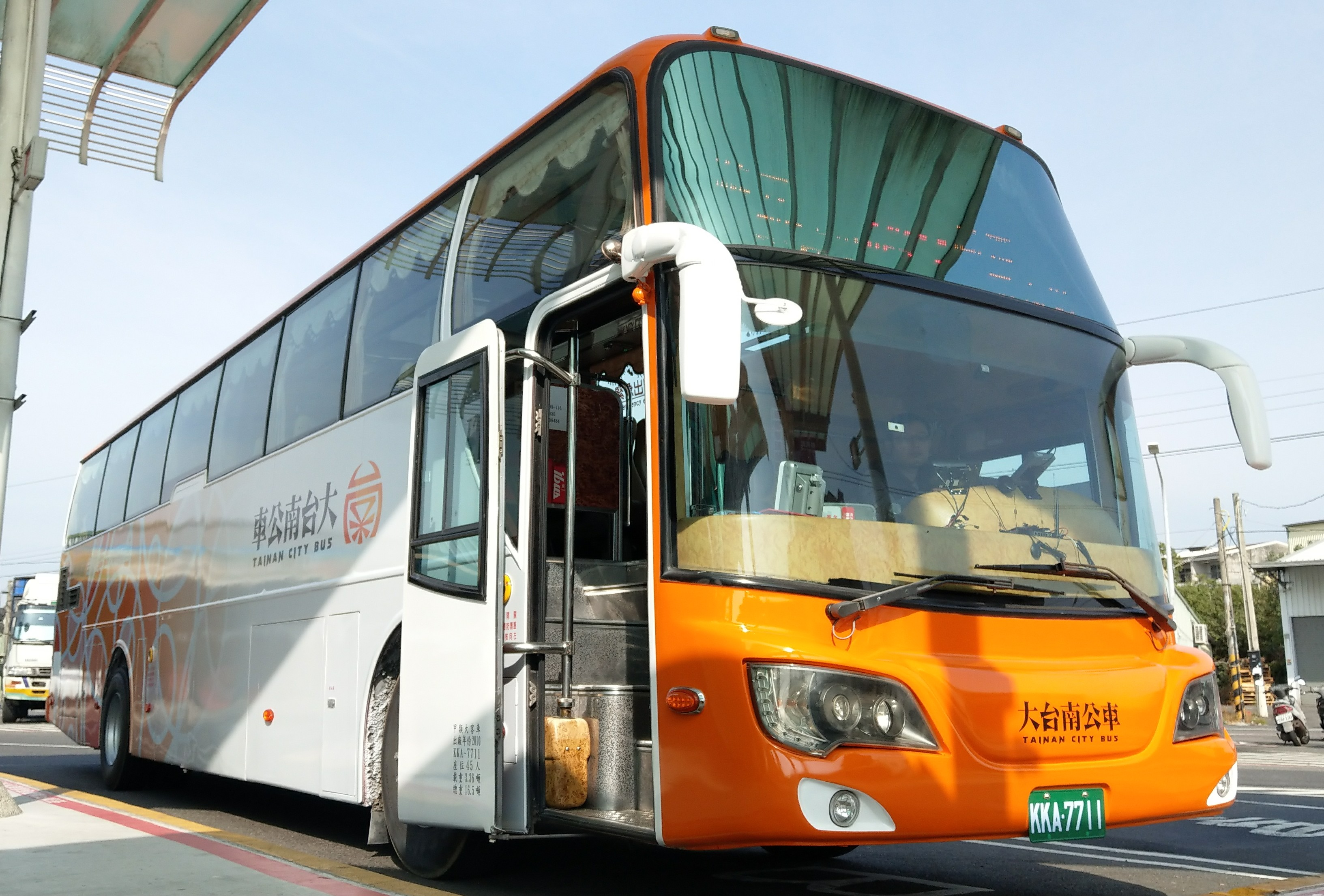 漢程客運2010年出廠Daewoo FX116，大台南公車橘9線配車KKA-7711。